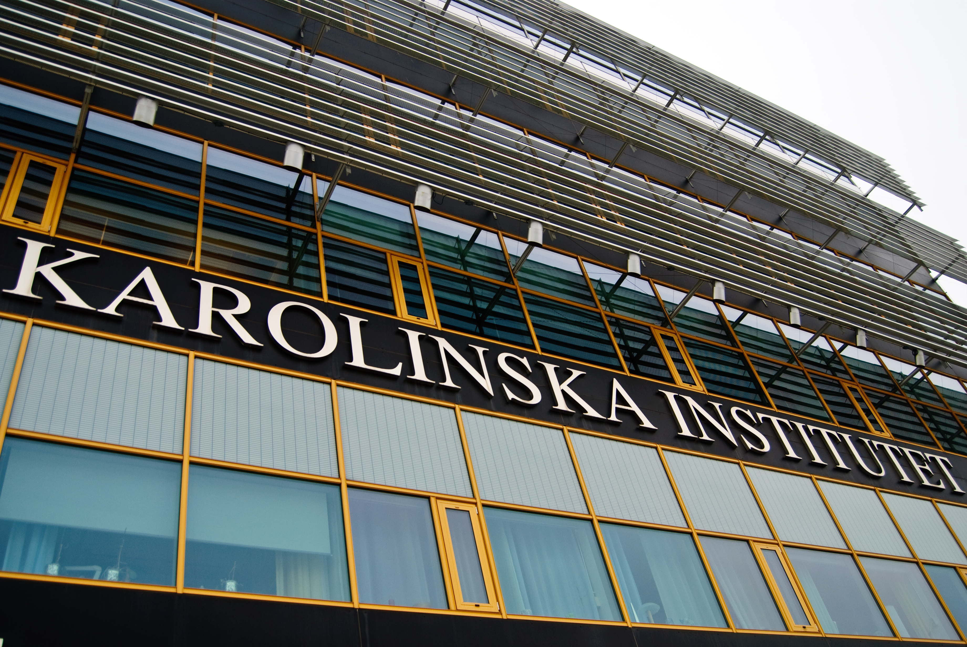 Karolinska Institutet